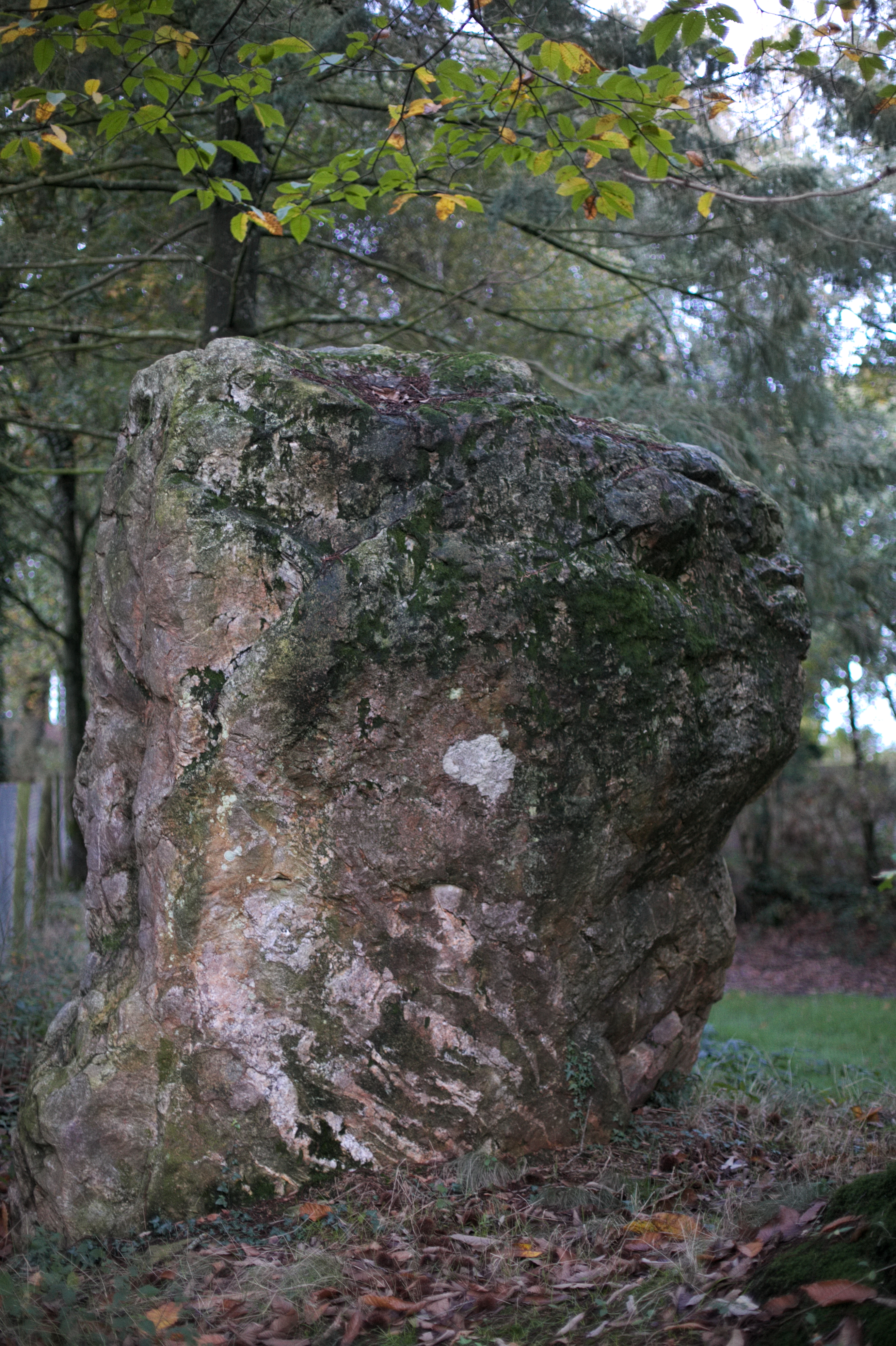 La pierre de Richebourg à Retiers.